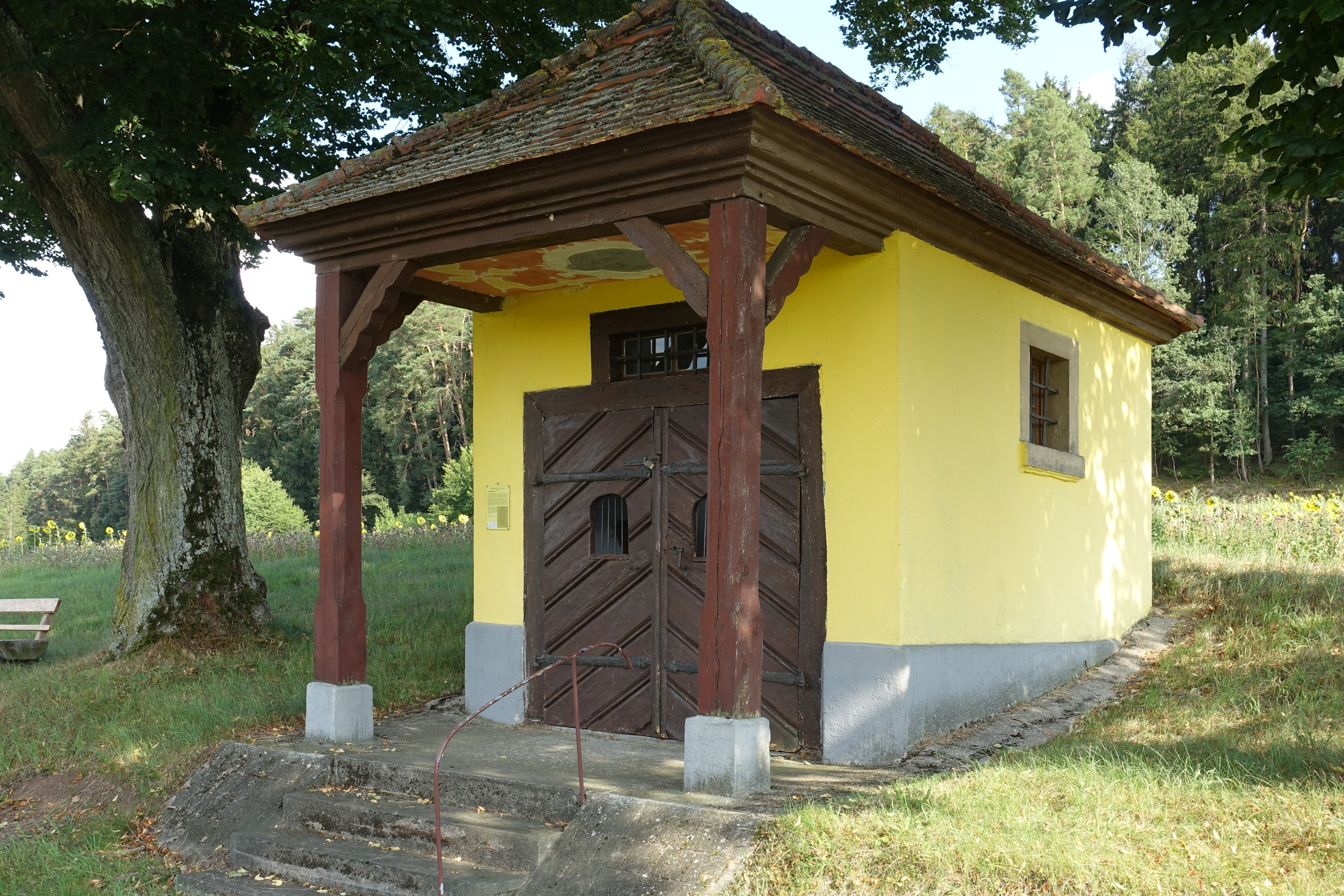 Eine der Veiter Wegkapellen